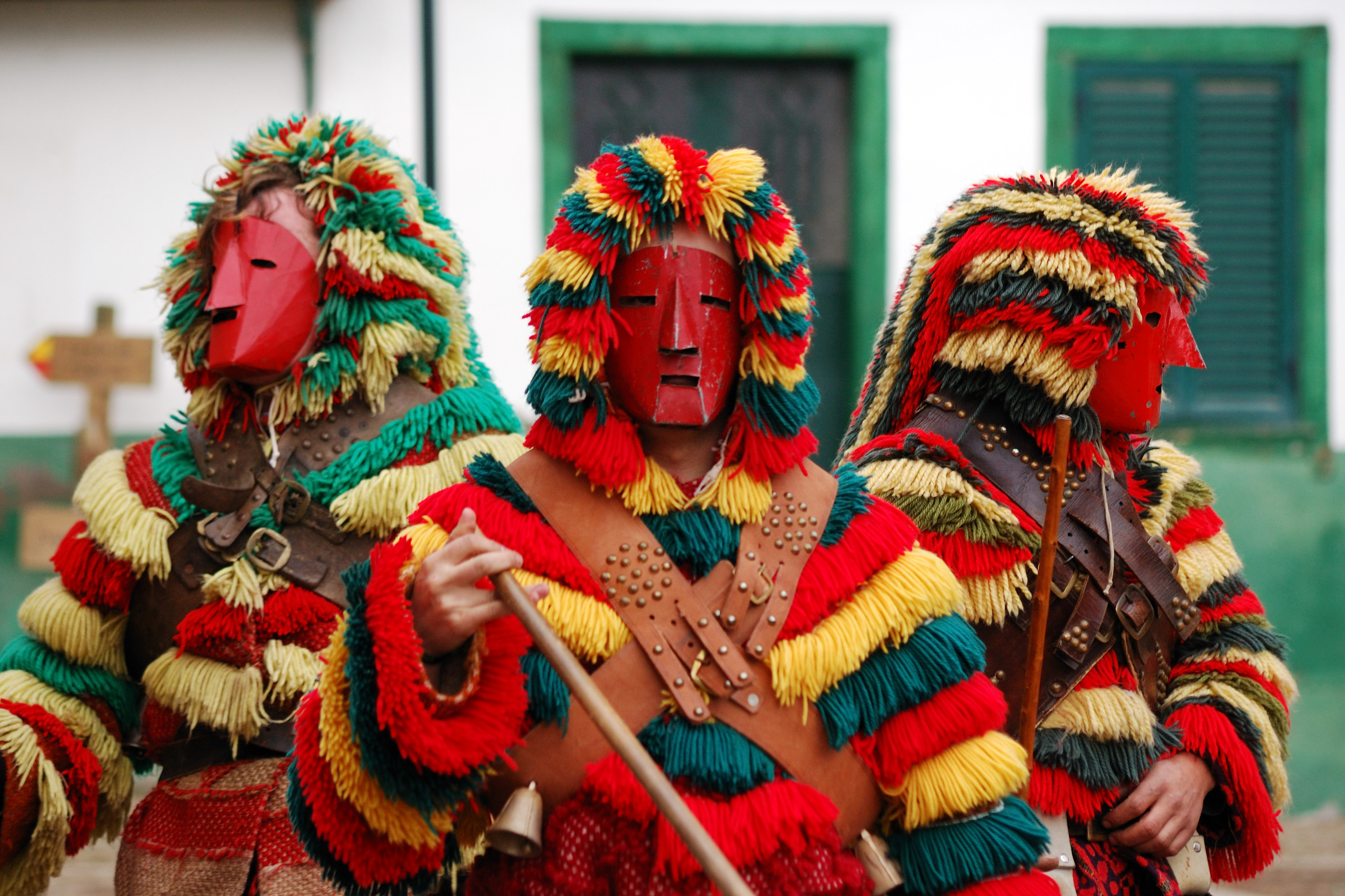 Carnaval de Podence, Portugal [2008]